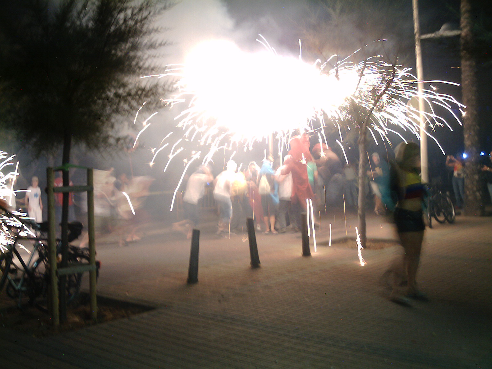 Correfocs a Can Pastilla, Palma (Mallorca) el 23 de juny de 2006. Autor: P. Pérez Author: P. Pérez. June 23rd, 2006.